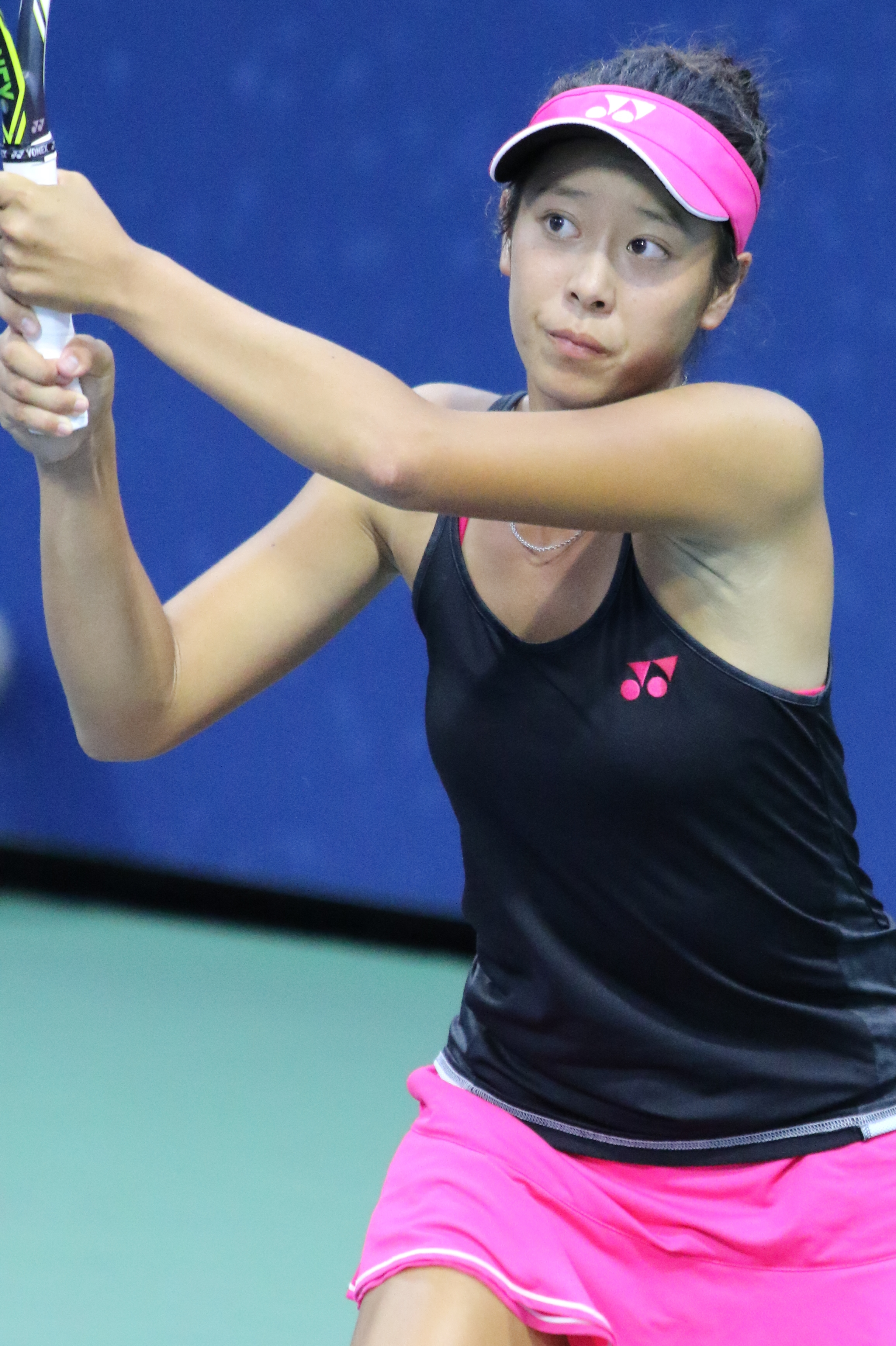 Shibahara US16 (1)